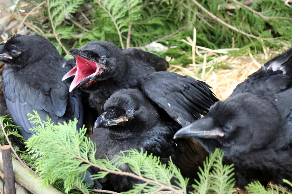 Nest jonge raven in Zoo Veldhoven, Nederland